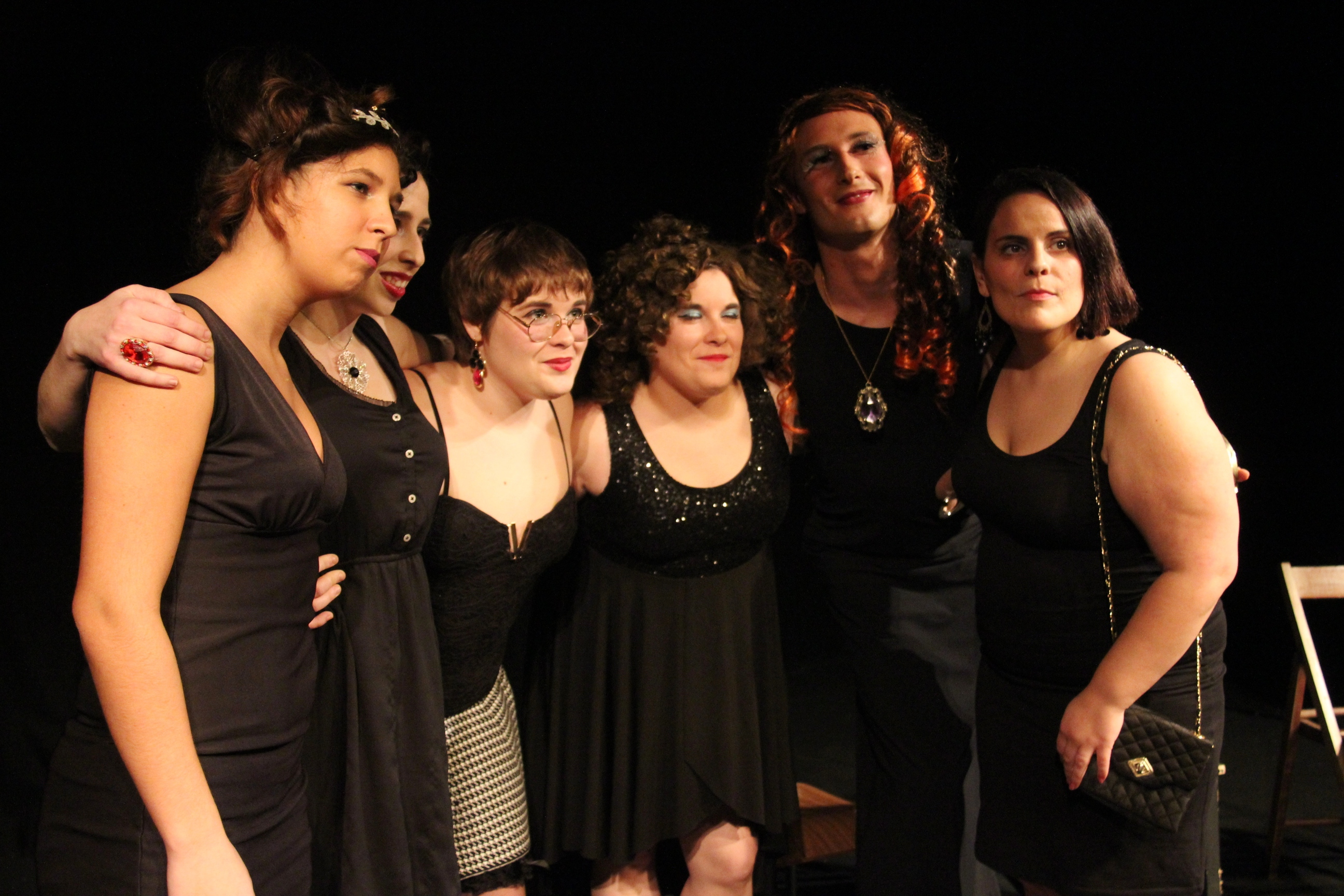 A equipa de Uma Questão de Sexo ou de Morte, da Companhia Vidas de A a Z.